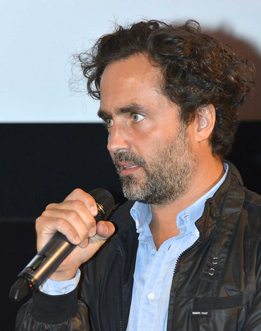 Erik Hemmendorff under presentationen av den Svenska filmhösten 2014 i Filmhuset i Stockholm den 18 augusti 2014.